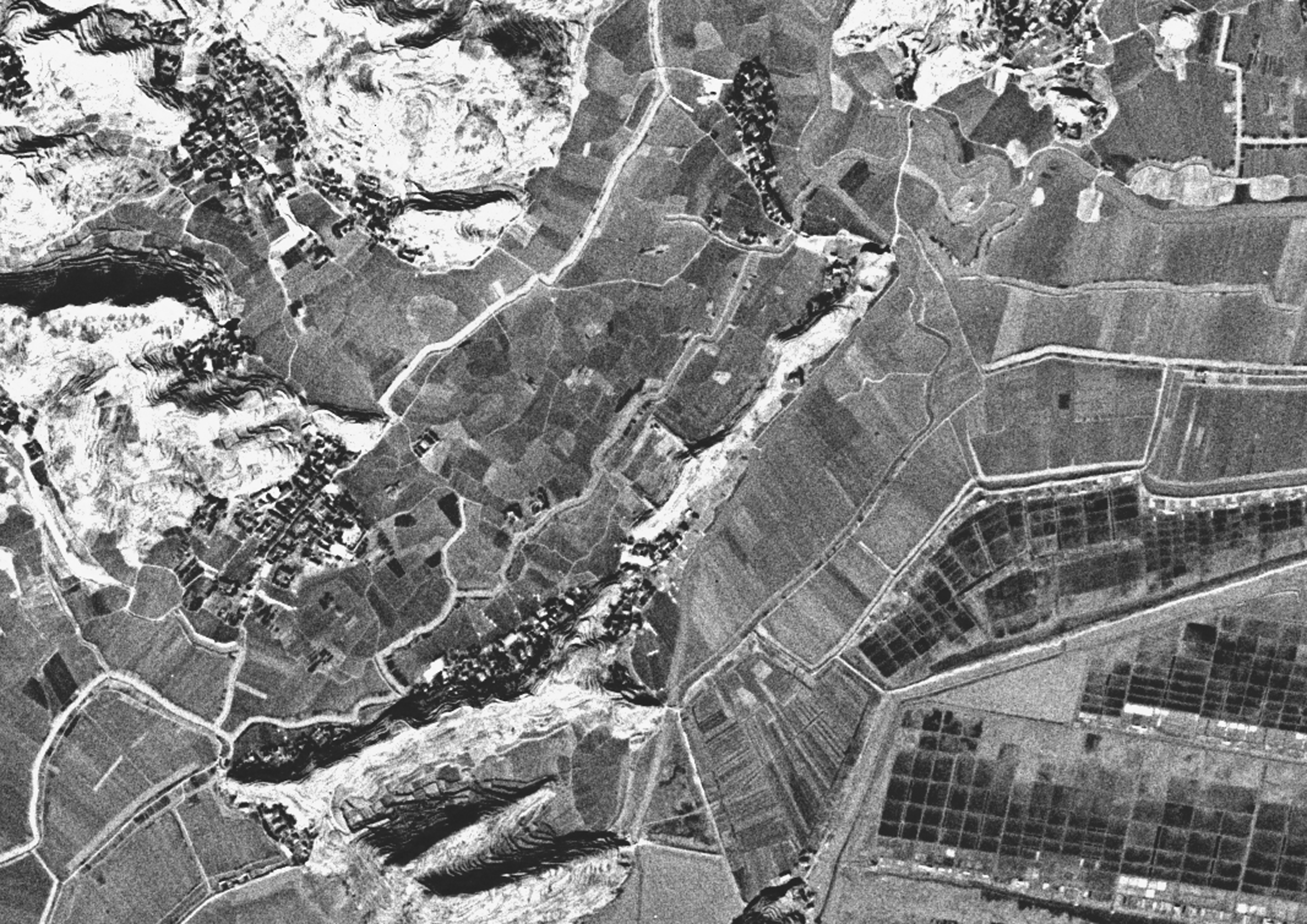 1970年原玉环县沙门镇泗边村小鹿巡检司城及周边地区卫星地图。